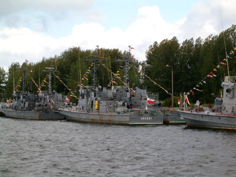 ORP Groźny wraz z bliźniaczymi okrętami zacumowane przy Molo Północnym portu wojennego w Helu tuż przed ostatnim spuszczeniem bandery.